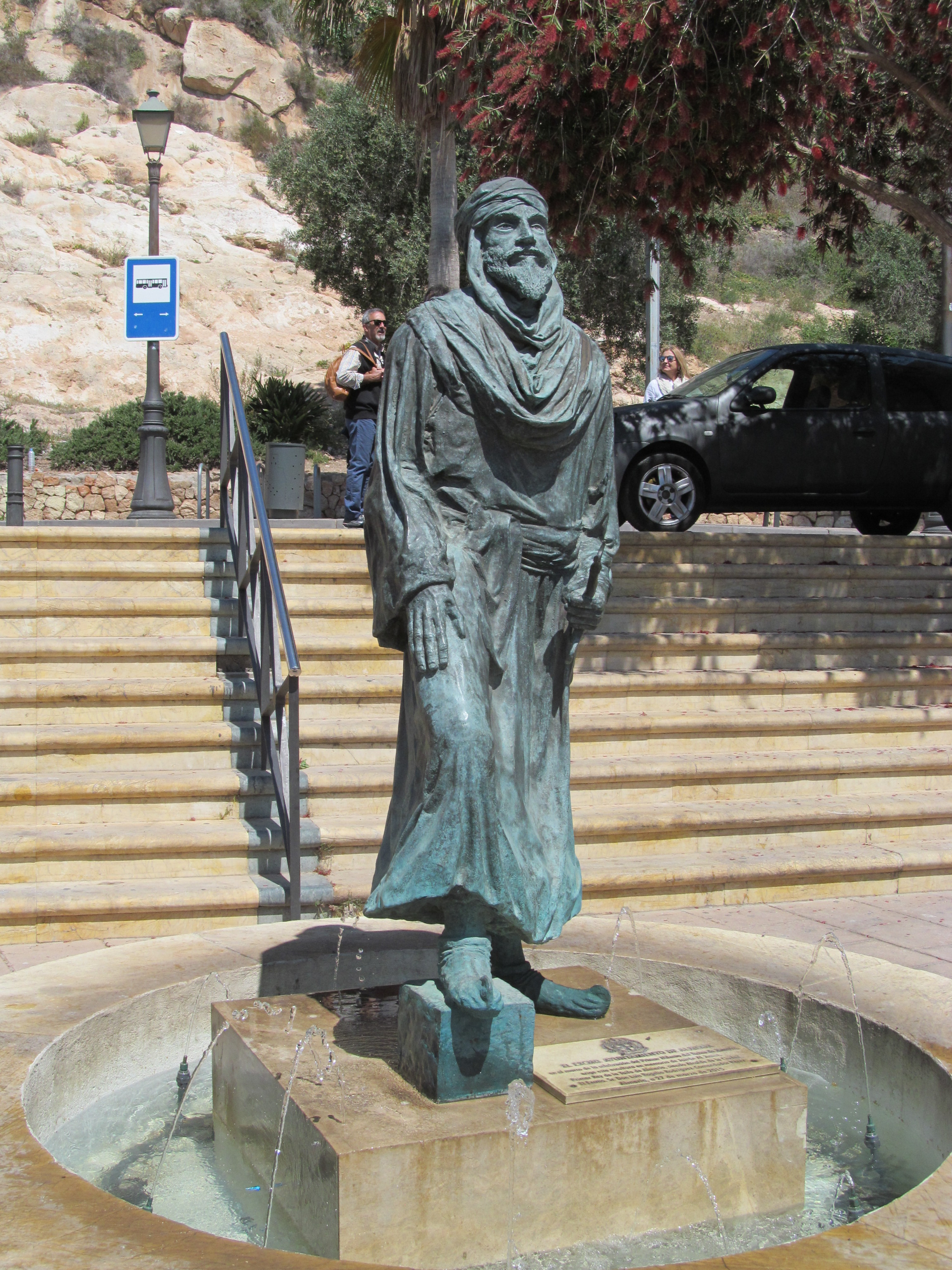 Almería- Escultura en bronce a los pies de la Alcazaba recuerda al primer rey de la Taifa de Almería, el Rey Jairán, que inició su mandato en el año 1014.